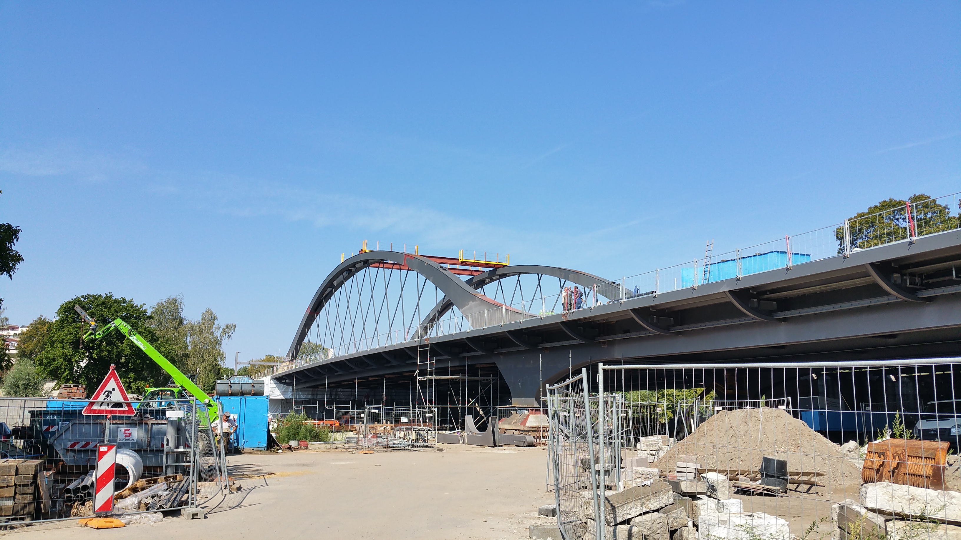 Neue Freybrücke Baufortschritt am 1. September